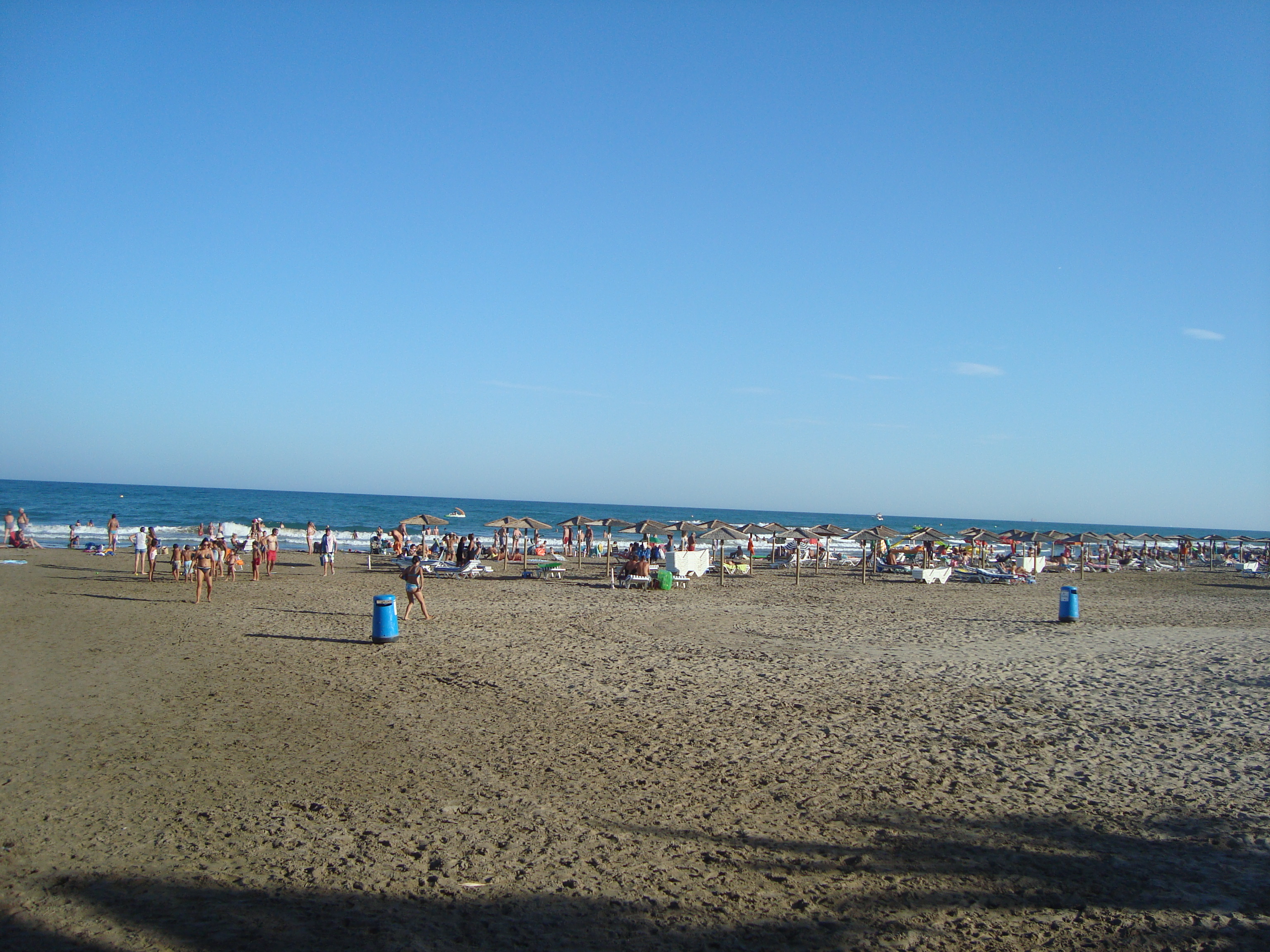 Platja de l'Almadrava (Benicàssim) This is a a photo of a beach in the Land of Valencia, Spain, with id: PL-1428